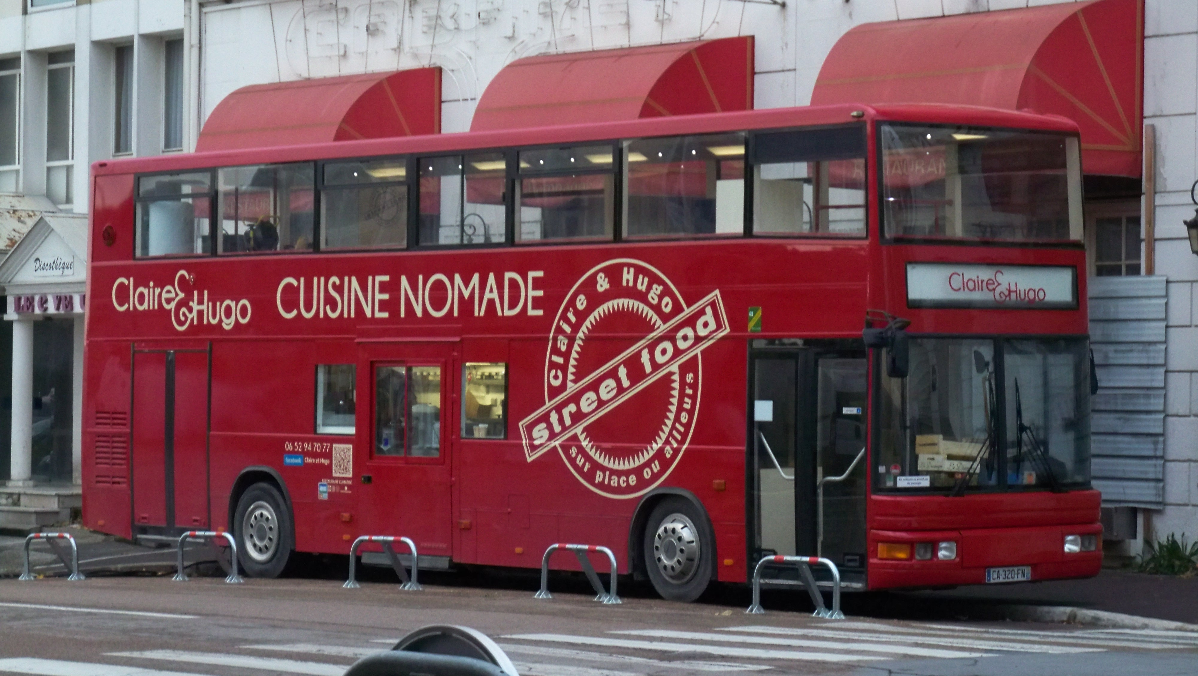 Le food truck « Claire et Hugo » près de la Gare de Troyes, ex bus berlinois